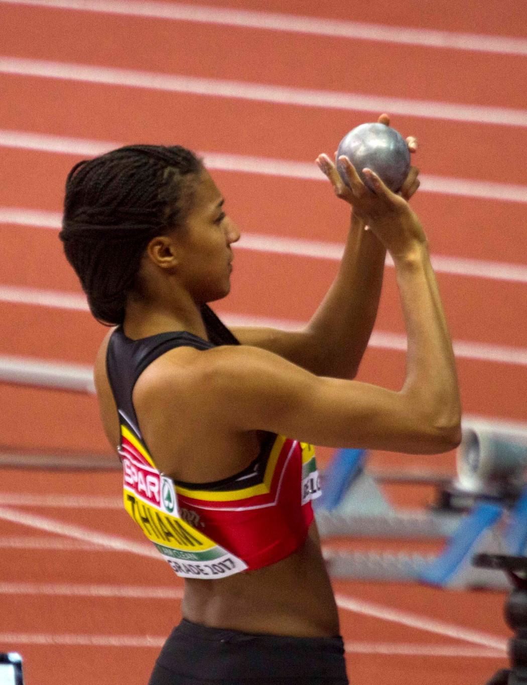 _195 pent kogel thiam